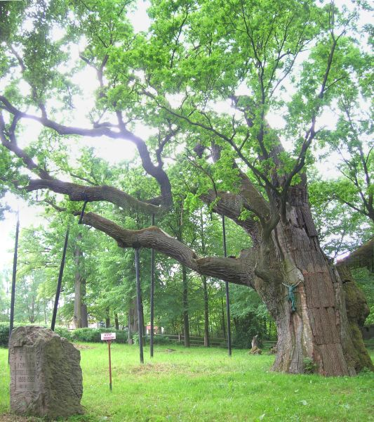 Dąb Bartek .